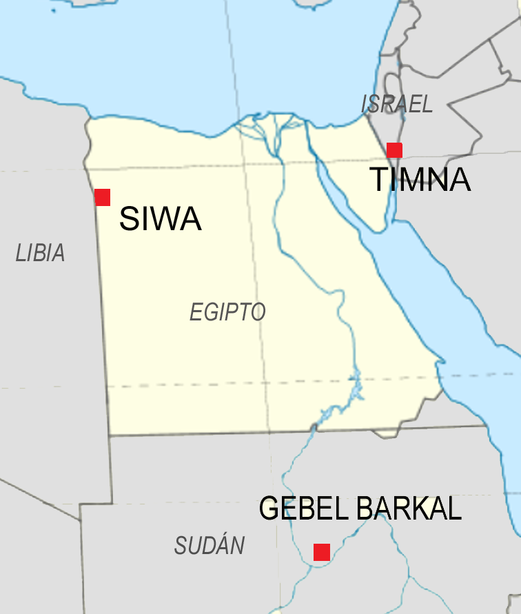 Límites en la distribución geográfica de los templos egipcios (vers. 2)